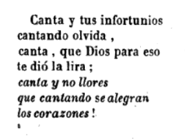 Cantar español